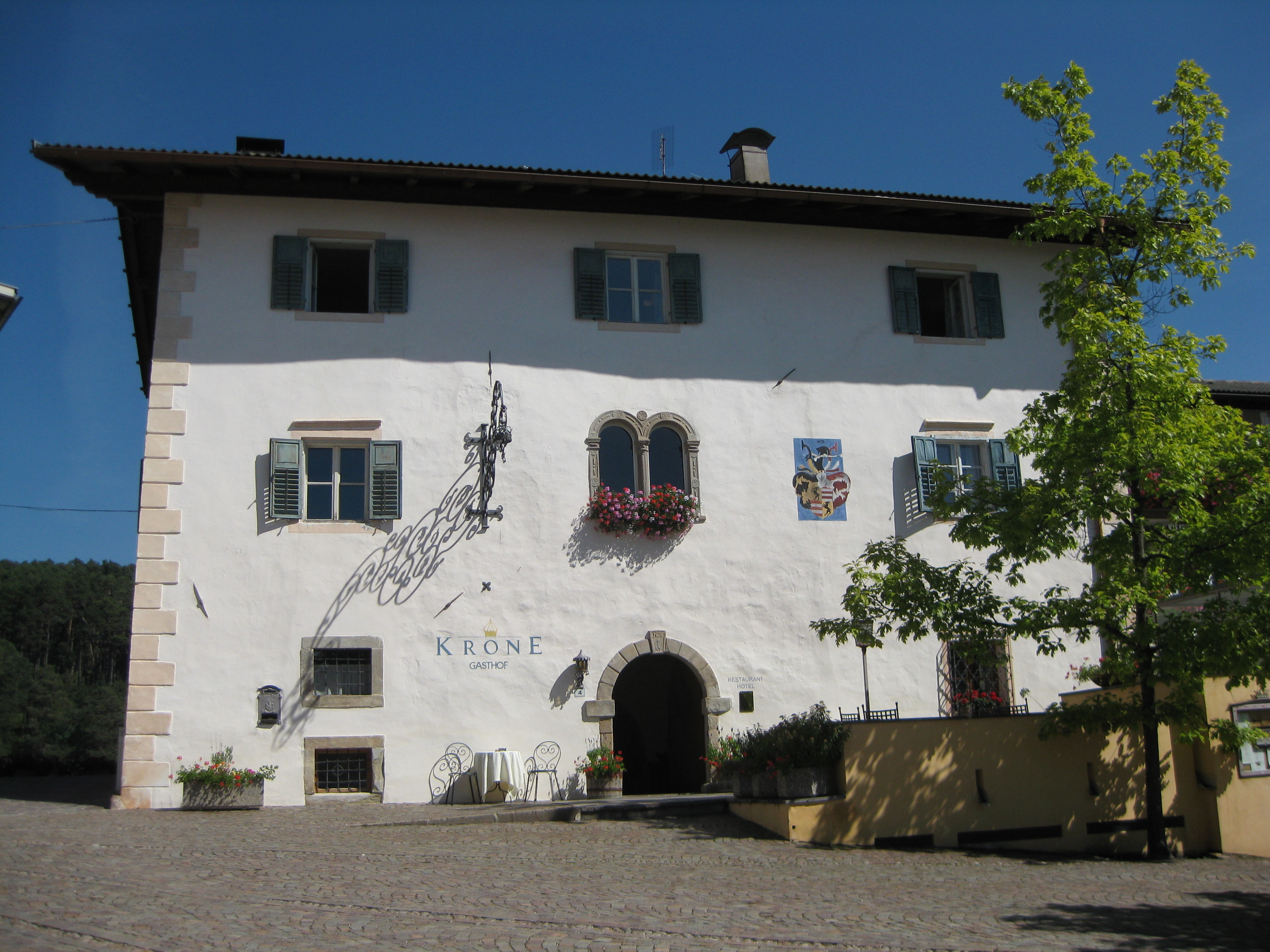 Gasthof Krone in Aldein